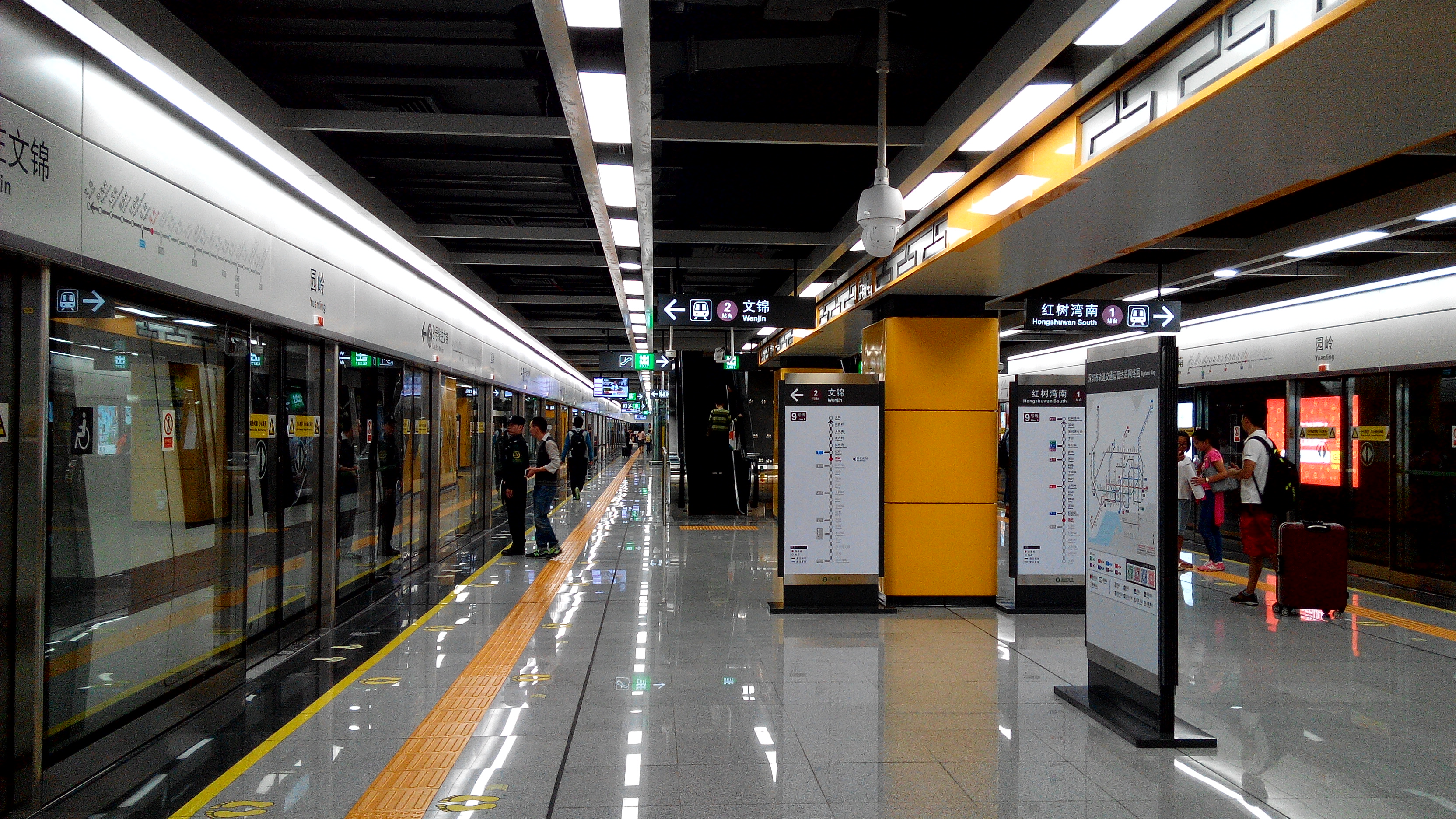 深圳地铁9号线 园岭站站台